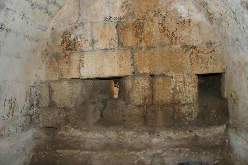 Yahmour